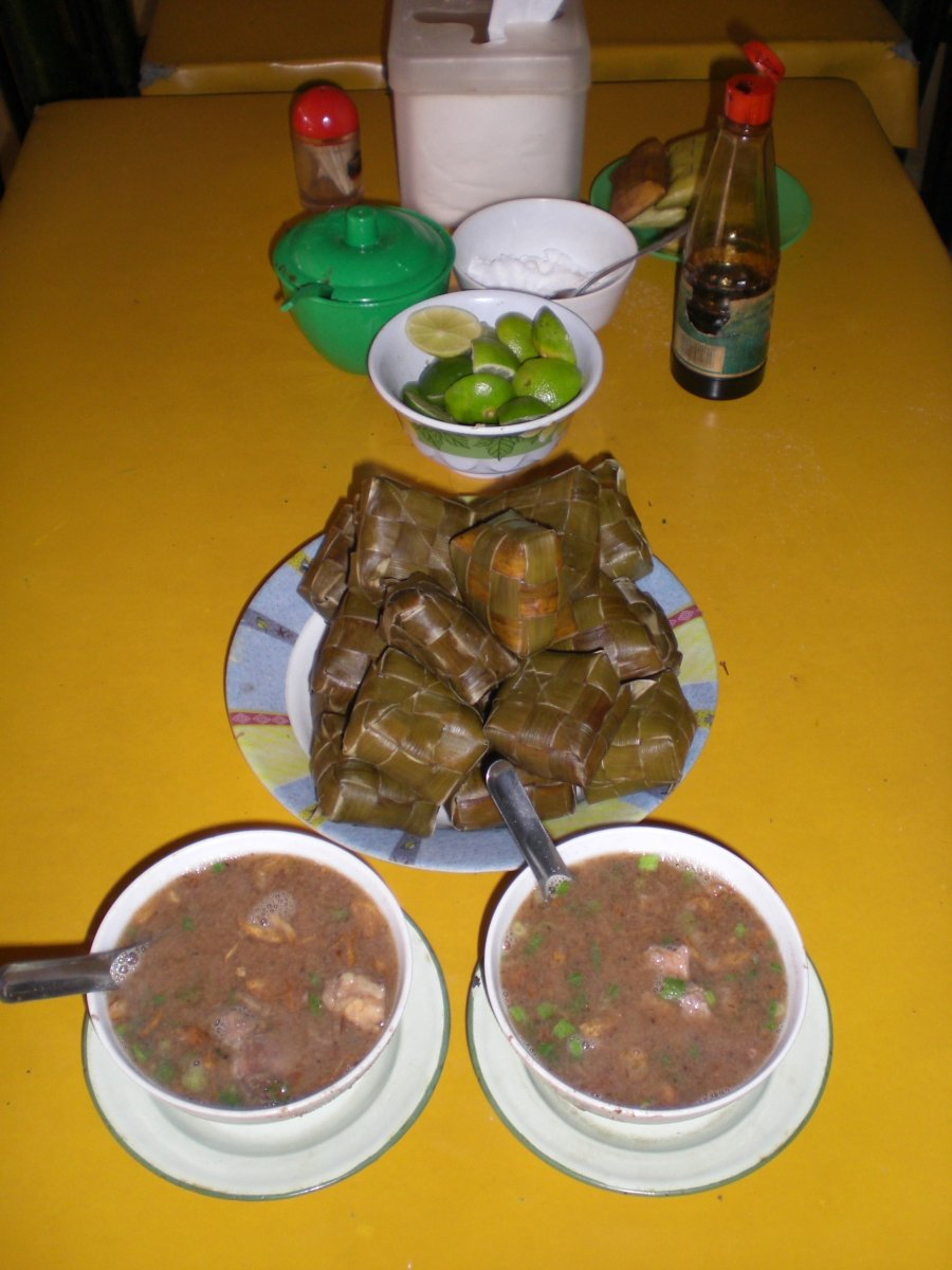 Coto Makassar with Ketupat